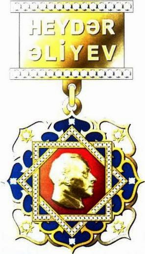 “Heydər Əliyev” ordeninin döş nişanı